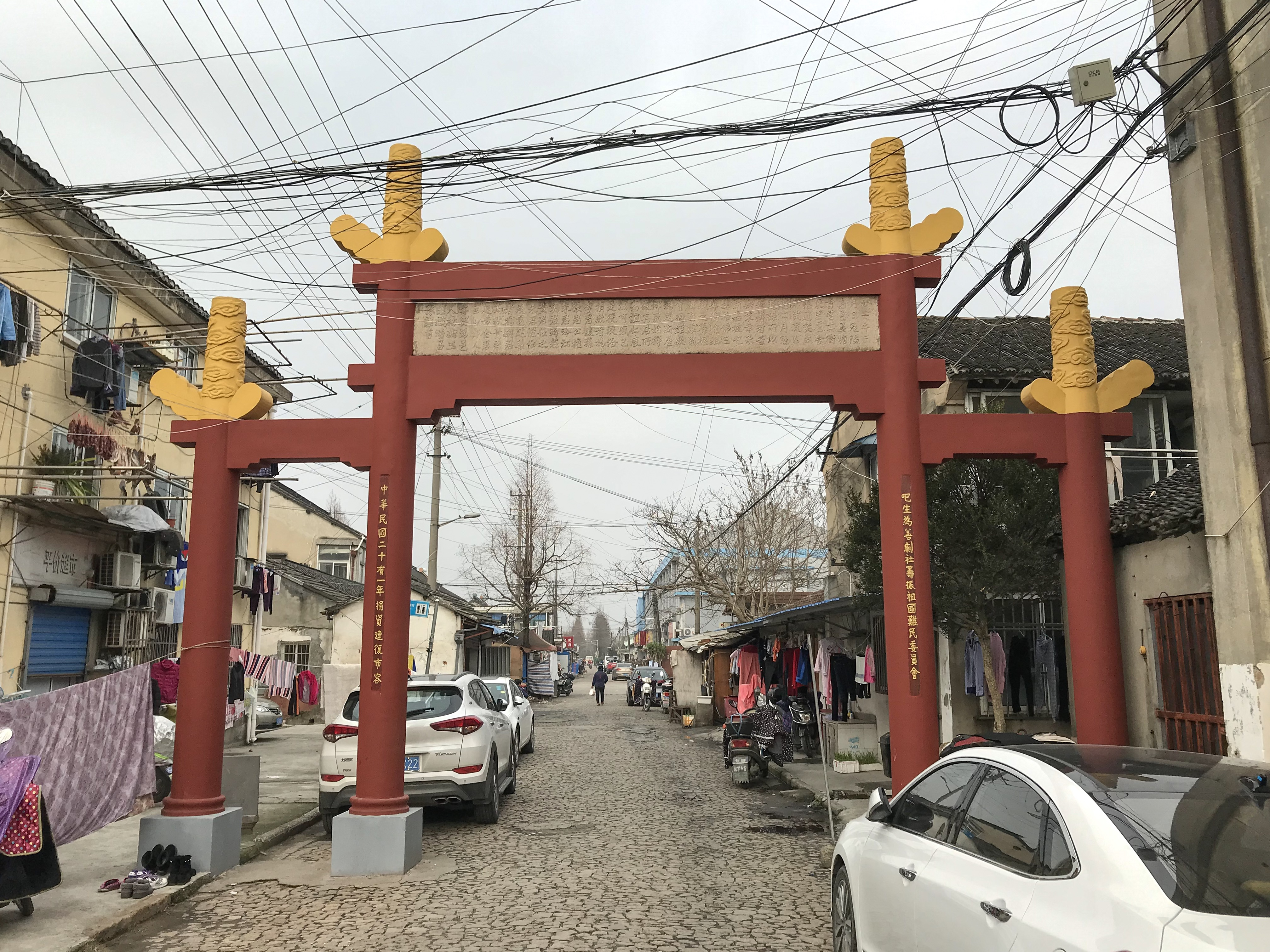 中文（中国大陆）: 娄塘纪念坊 背面